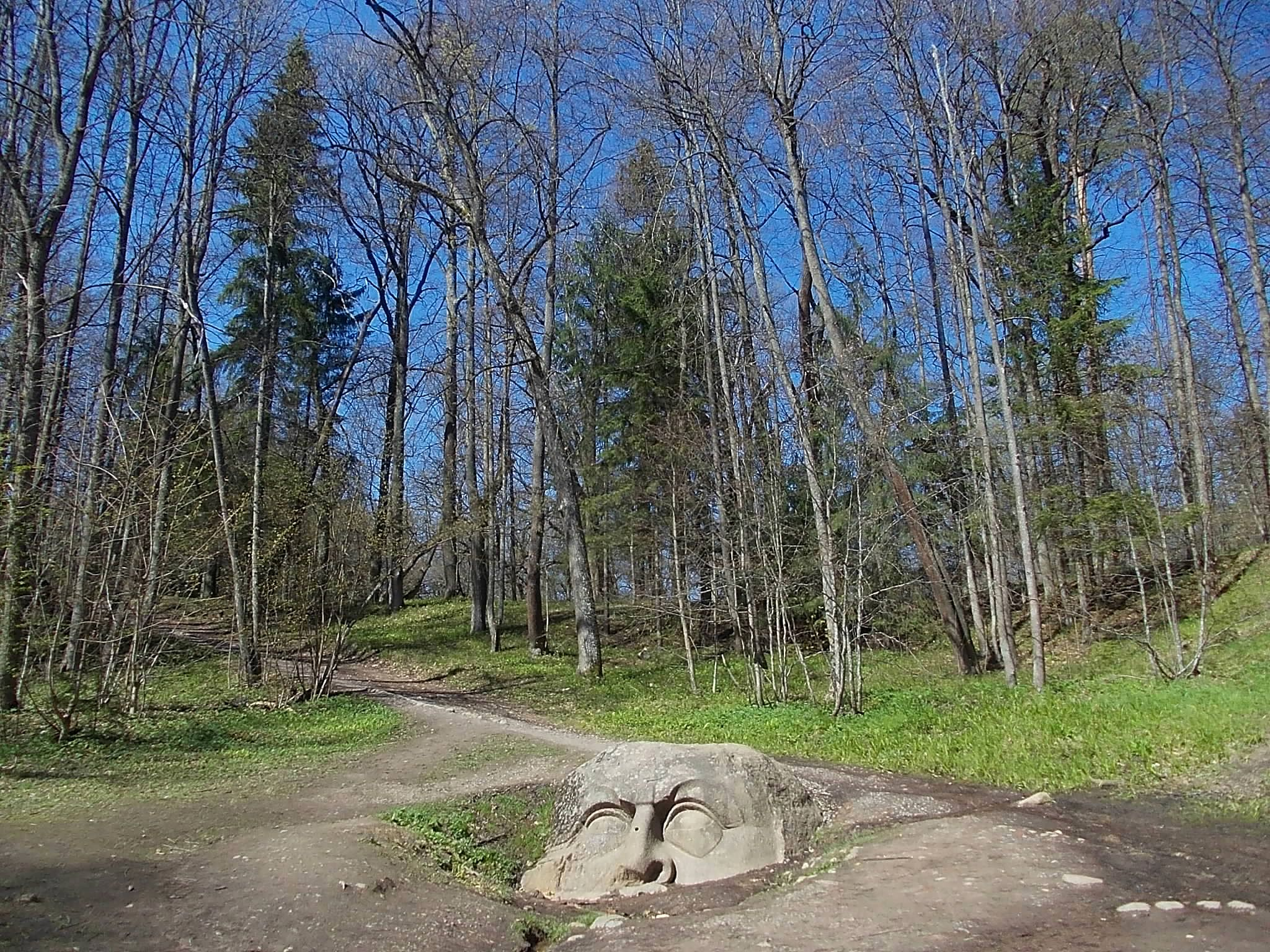 Общий план